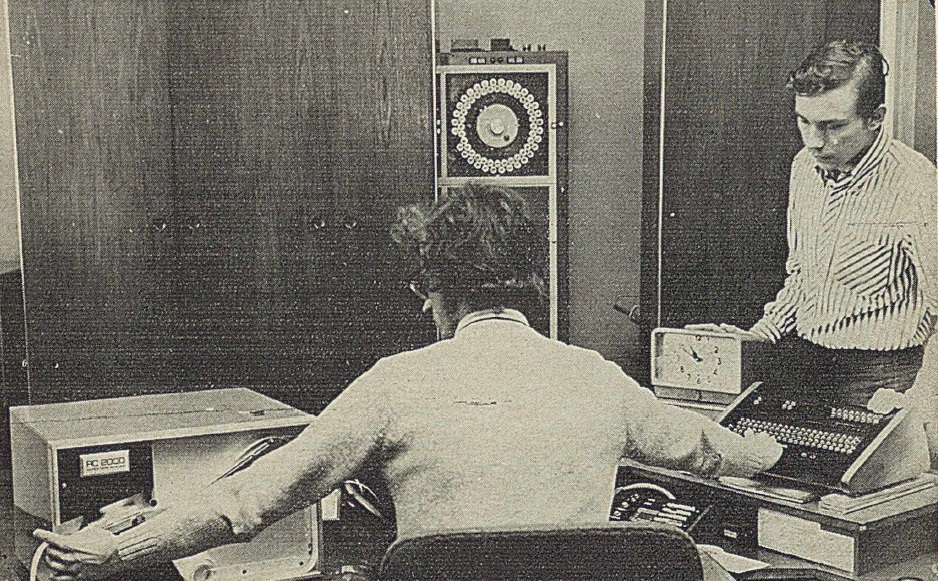 GIER w ZON